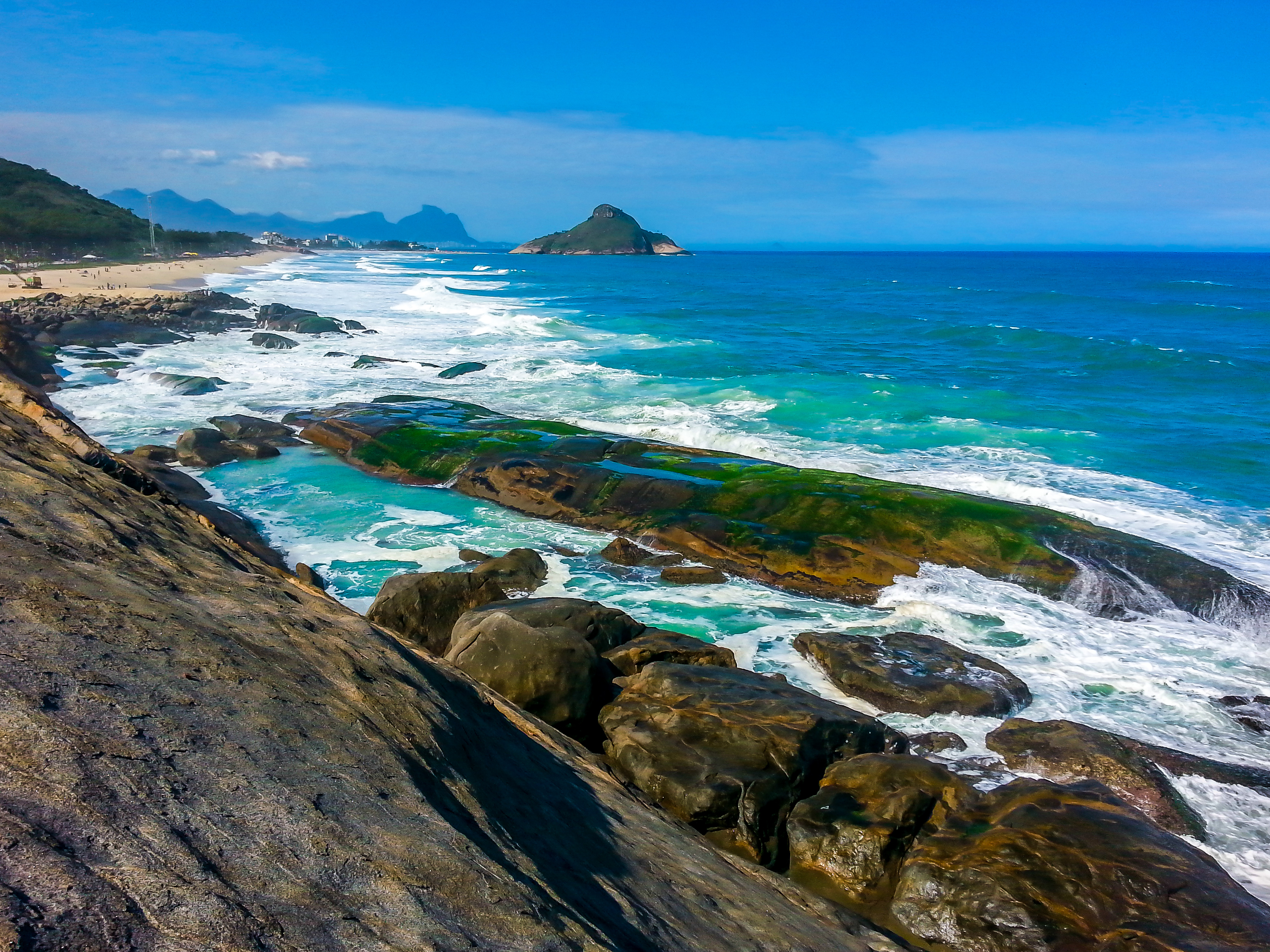 Praia do Secreto no Recreio dos Bandeirantes, até pouco tempo bem desconhecida